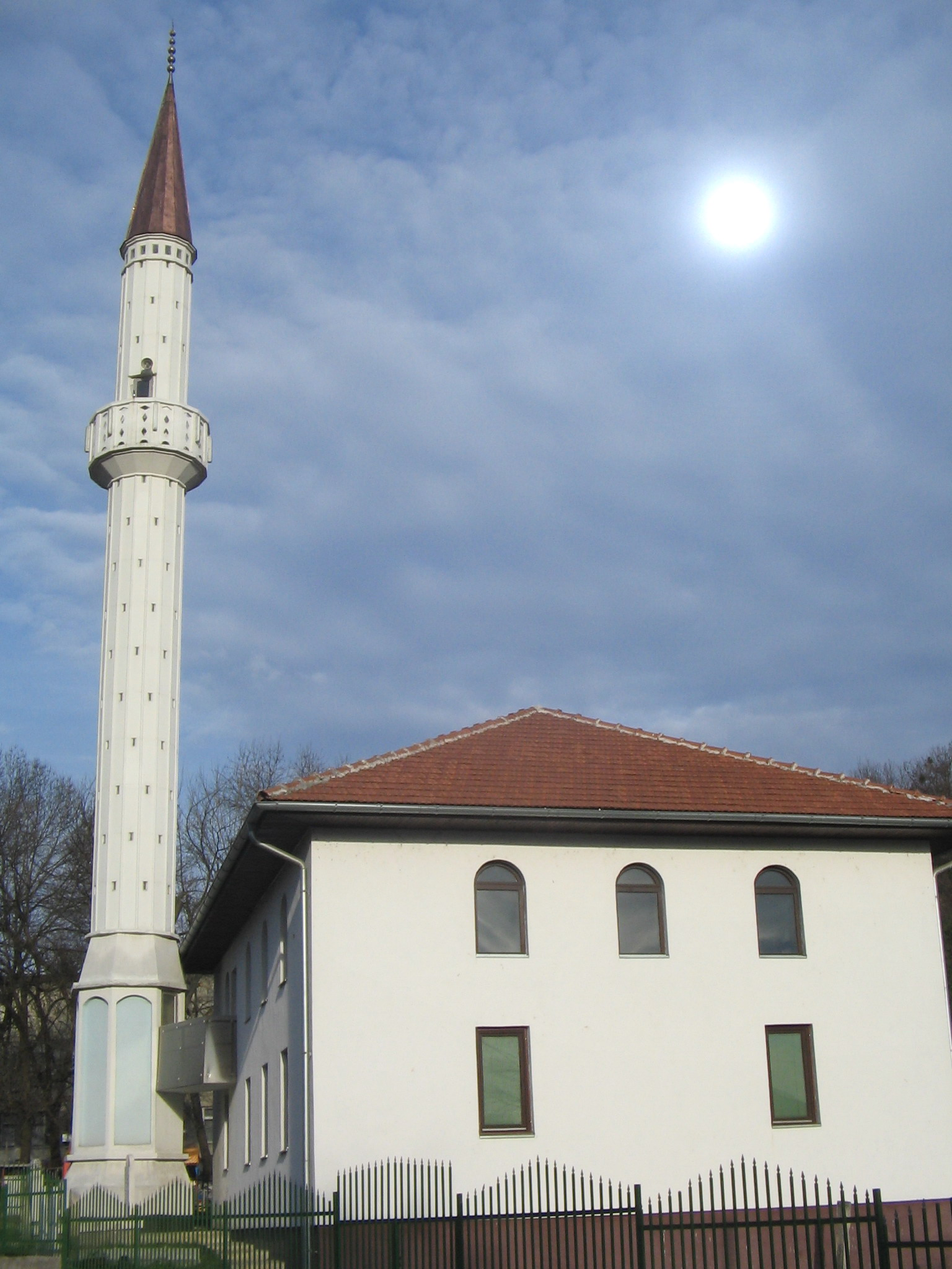 Сефер-бегова (Подпећинска) џамија у Бањој Луци